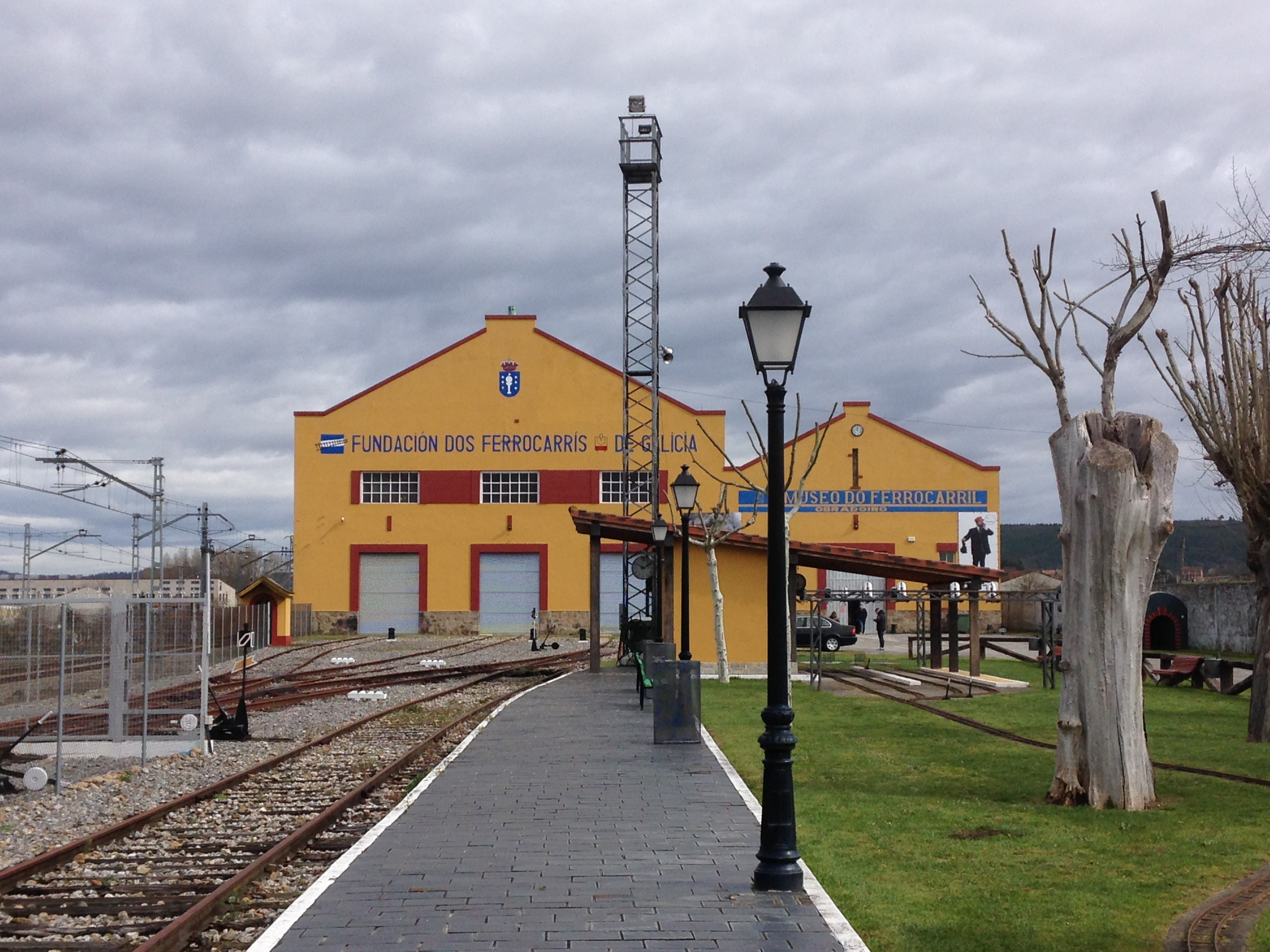 Edificio principal do Museo do Ferrocarril de Monforte de Lemos.